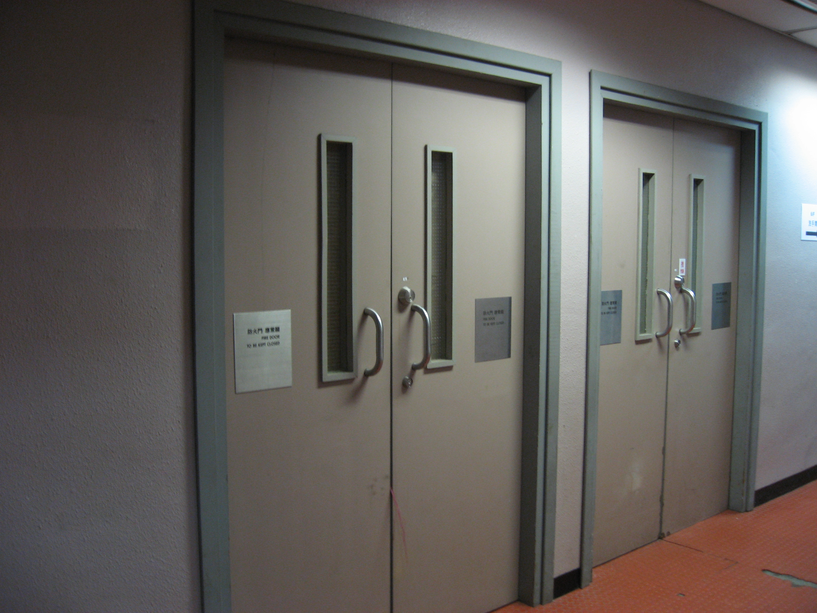 荃灣公共圖書館6樓空置區域